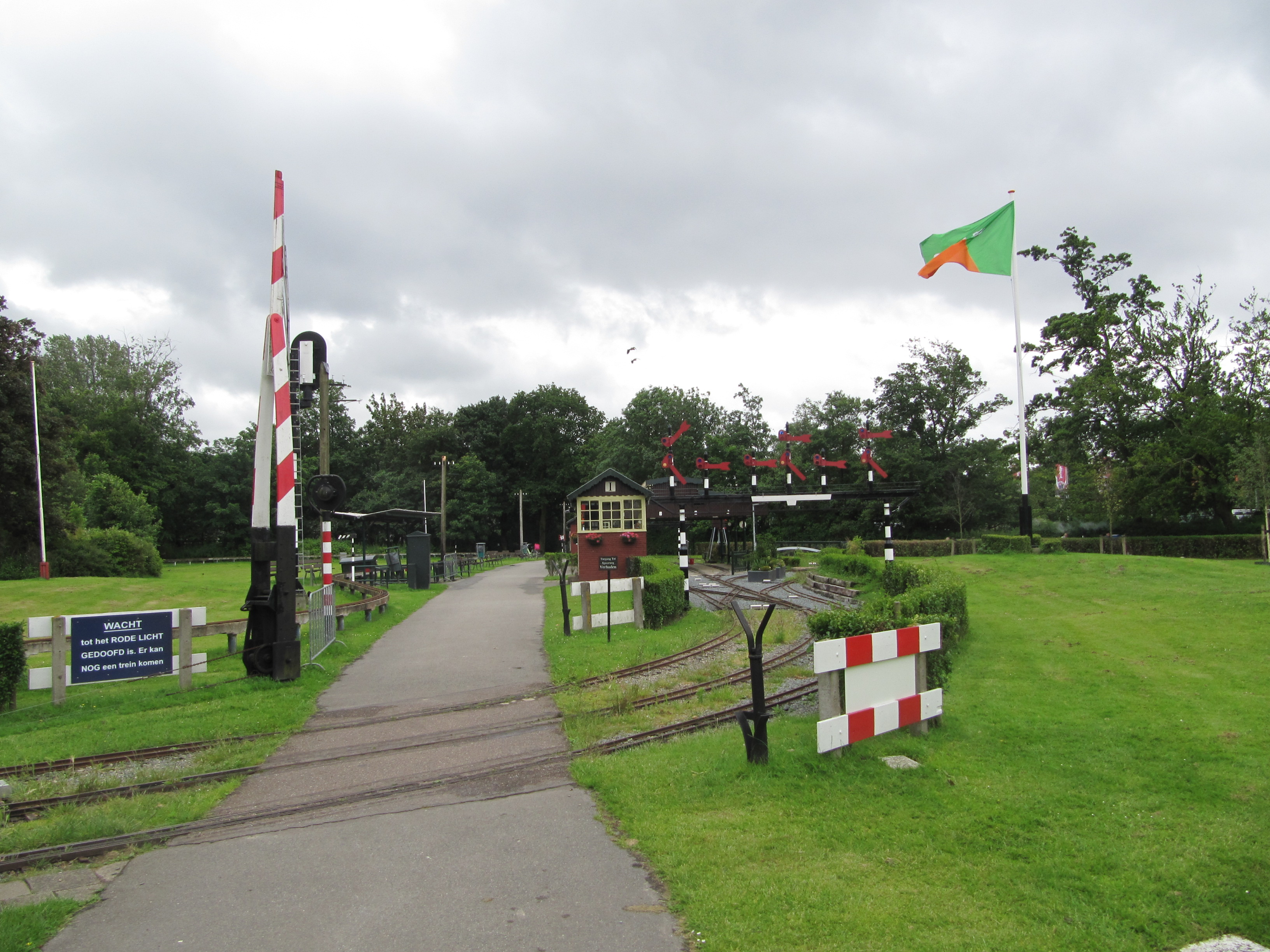 Locatie Zuiderpark - Stoomgroep West Zuiderpark